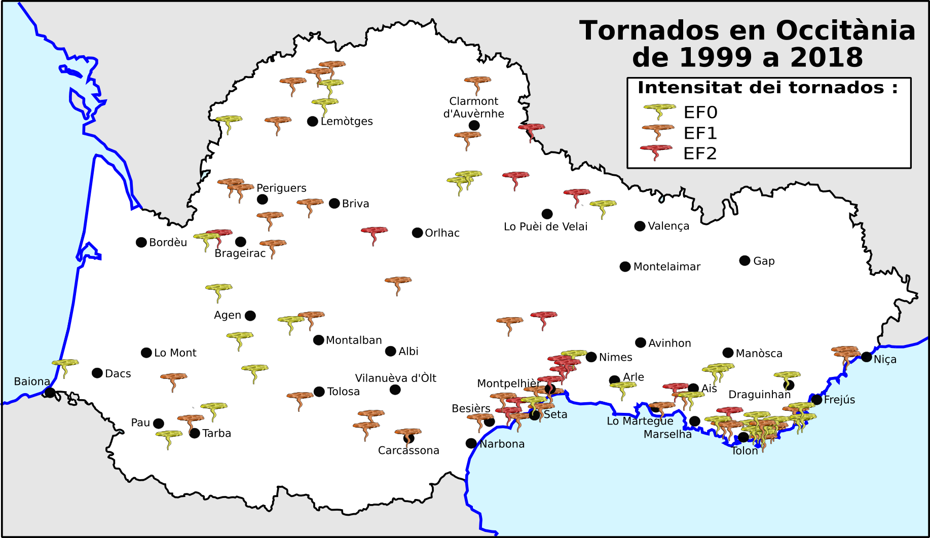 Tornados observats en Occitània entre 1999 e 2018.